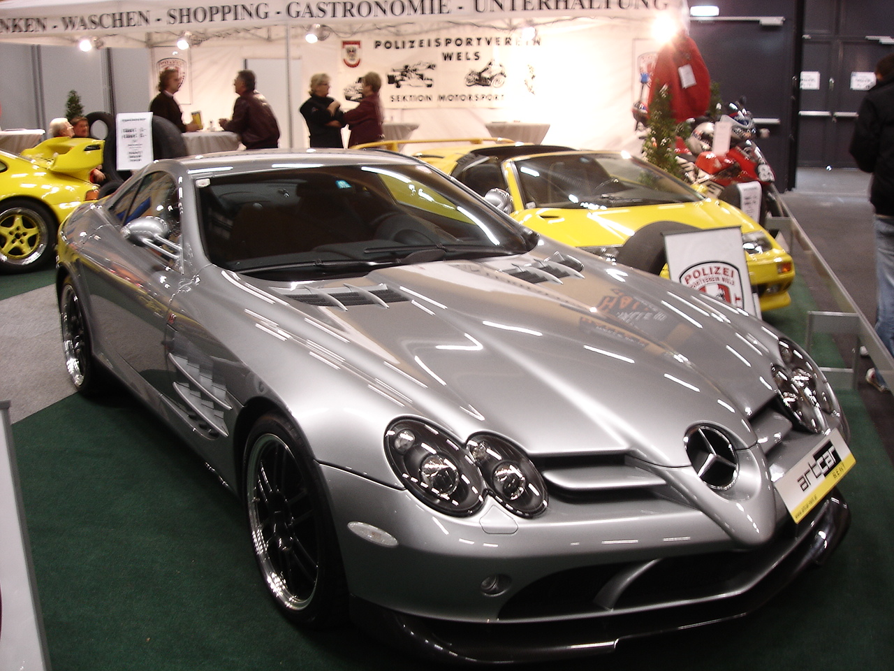 Mercedes Benz SLR McLaren 722 Edition